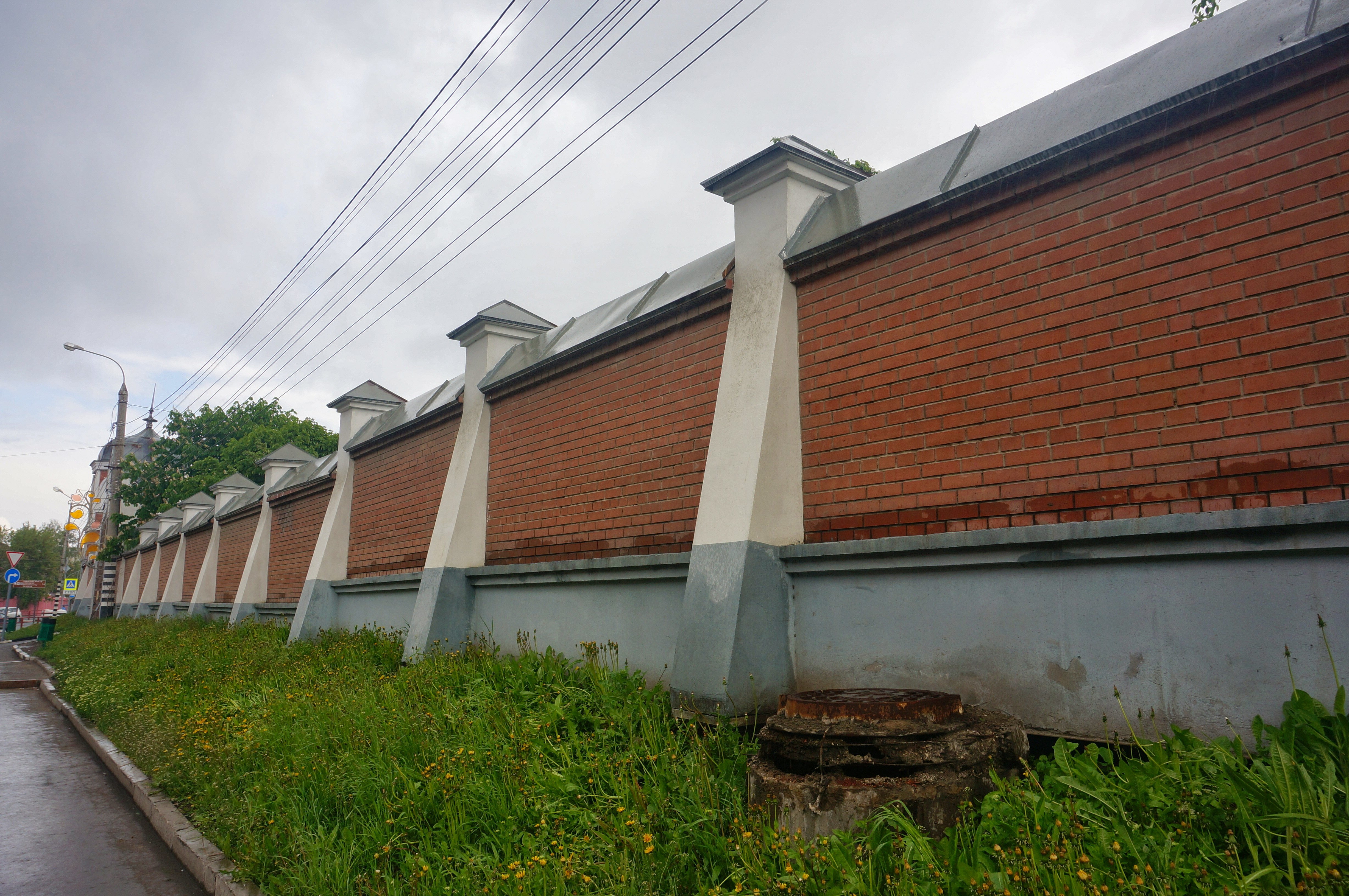 Иверский женский монастырь, Самара, Россия